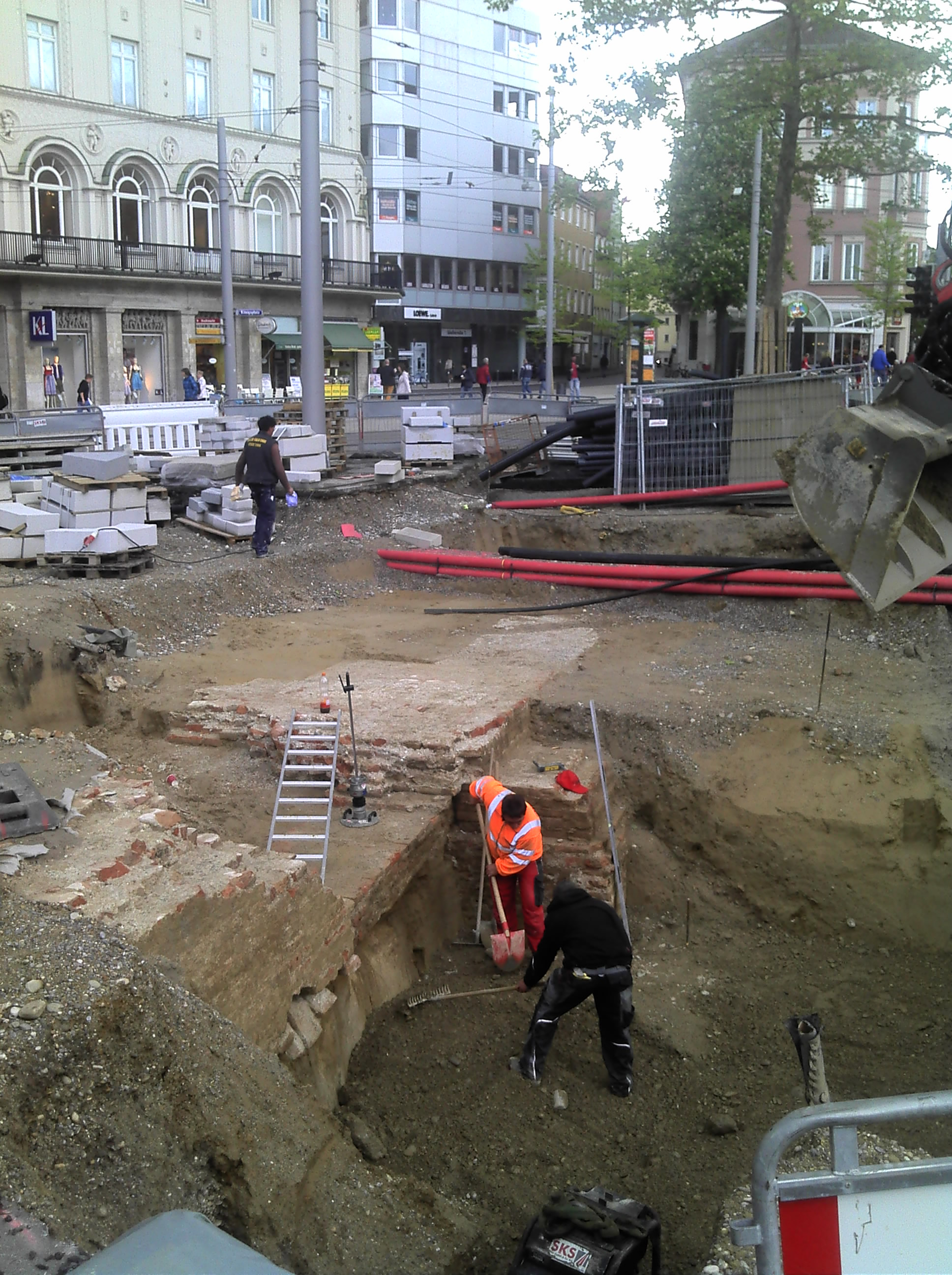 Bei Bauarbeiten freigelegte Fundamente beim ehemaligen Gögginger Tor, heute am Königsplatz in Augsburg. Position etwa N 48.36663, E 10.89452.